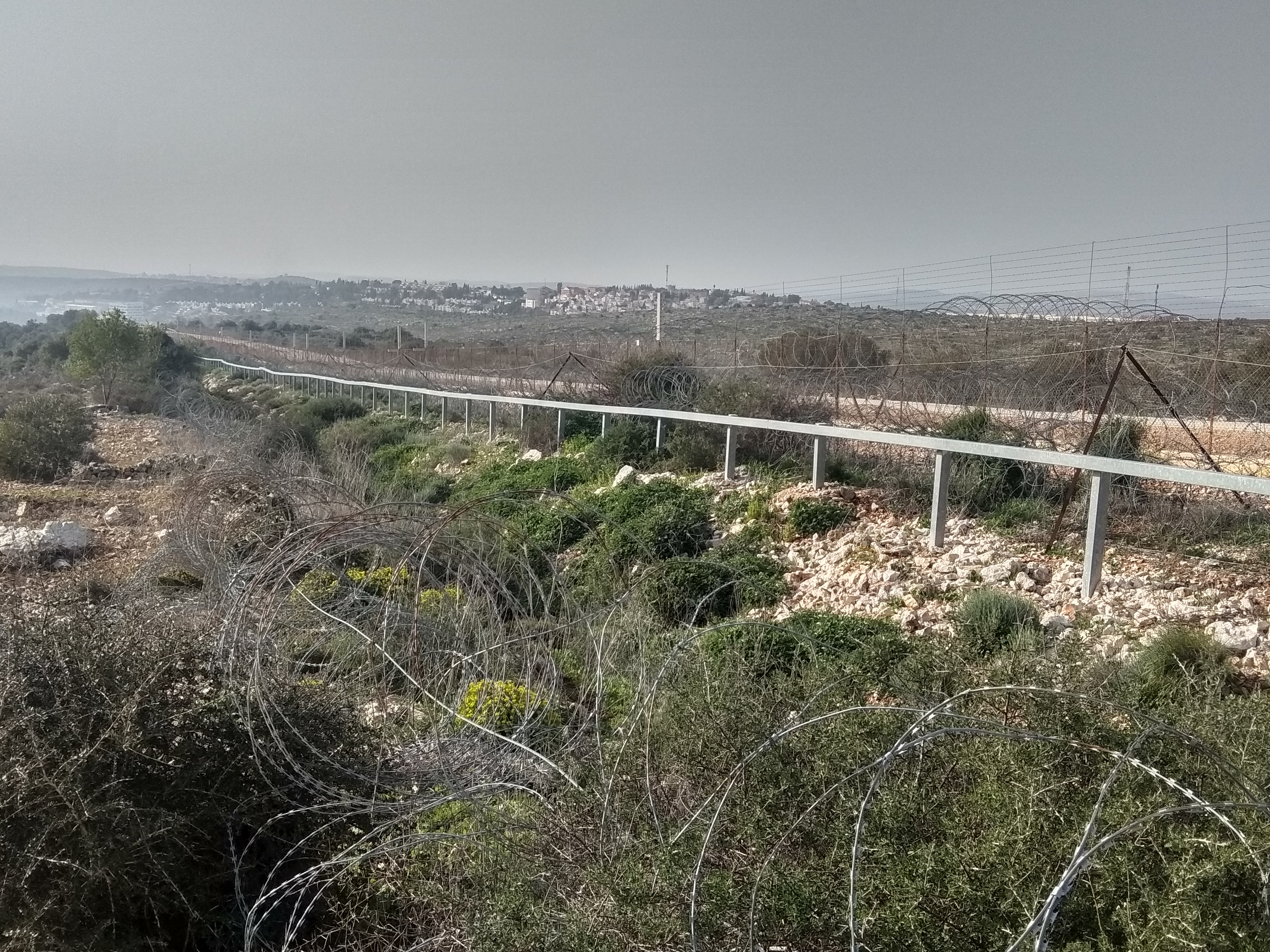 مقطع من مقاطع الجدار الإسرائيلي في الضفة الغربية بين مدينة سلفيت ومستوطنة أرئيل. 2-2019.